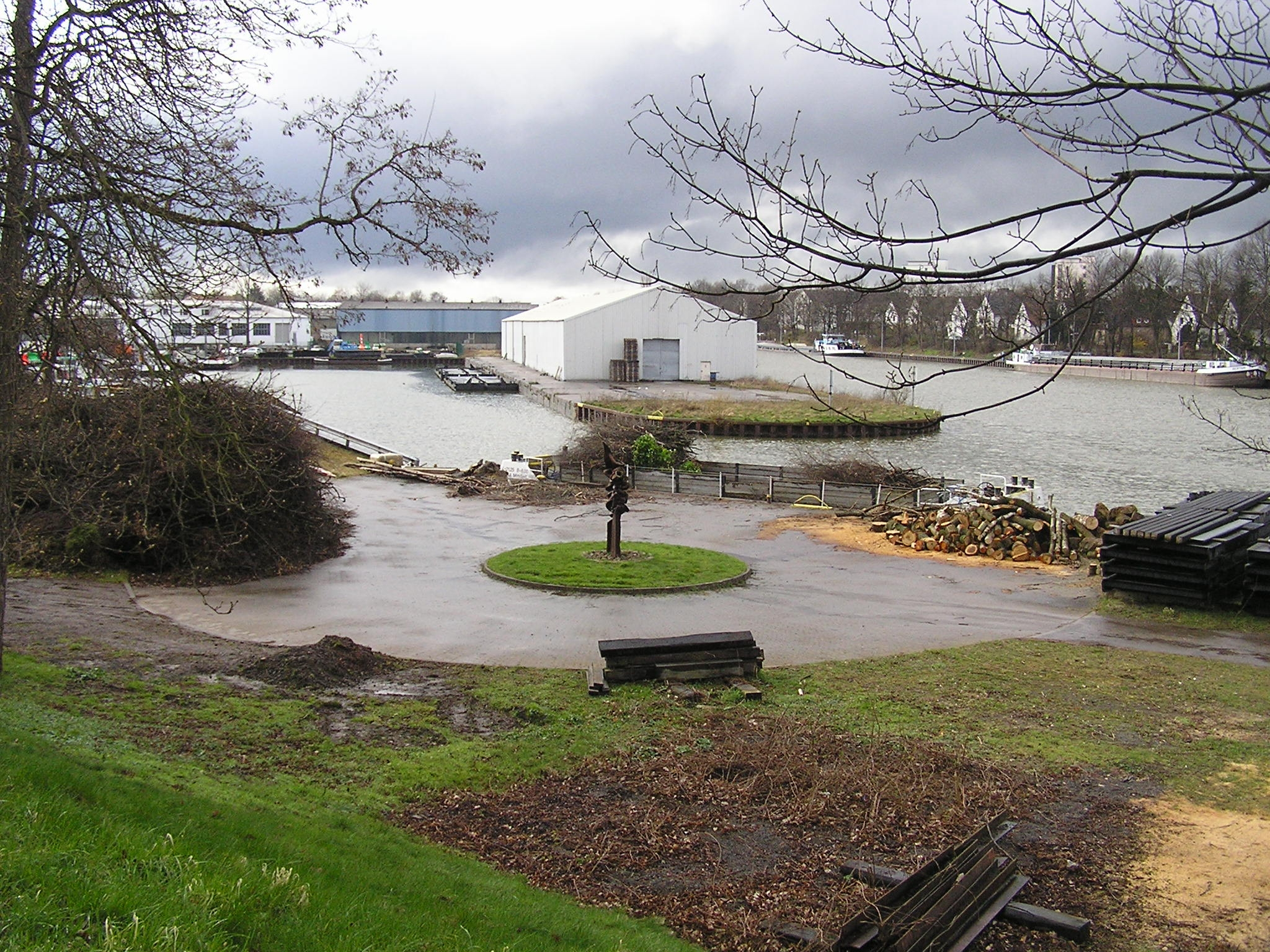 Der ehemalige Schlepphafen des Schleppamtes Minden am Mittllandkanal und unweit des Wasserstraßenkreuzes Minden in Minden, Nordrhein-Westfalen.